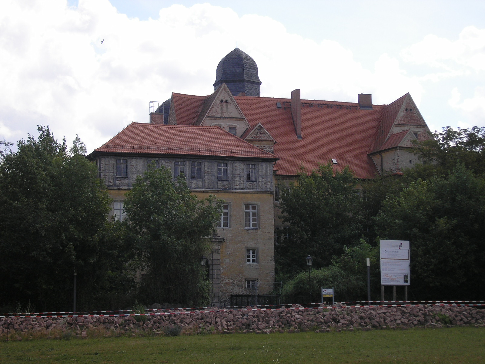 Teile des Residenzschlosses in Köthen (Anhalt).